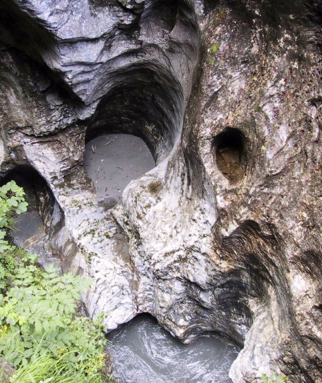 Strudeltöpfe, entstanden durch Erosion durch Wasserwirbel in einen Gebirgsbach (Liechtensteinklamm)